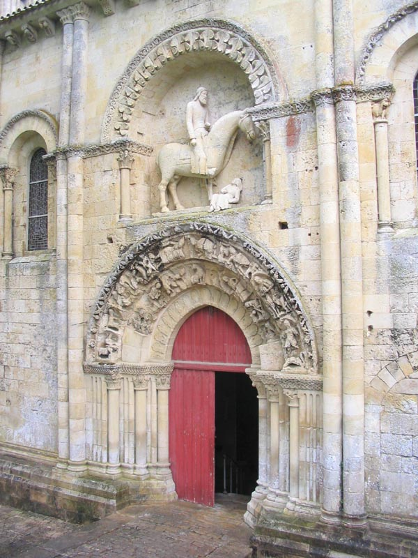 Portail nord de l’église de Saint Hilaire à Melle (Deux-Sèvres) ( 79500 ) en France. Ce portail est surmonté par un cavalier en haut-relief, symboliserait la victoire de Constantin Ier sur les païens, surmontant le combat des vices et des vertus. L'église Saint-Hilaire est classée au patrimoine mondial de l'UNESCO depuis 1998.